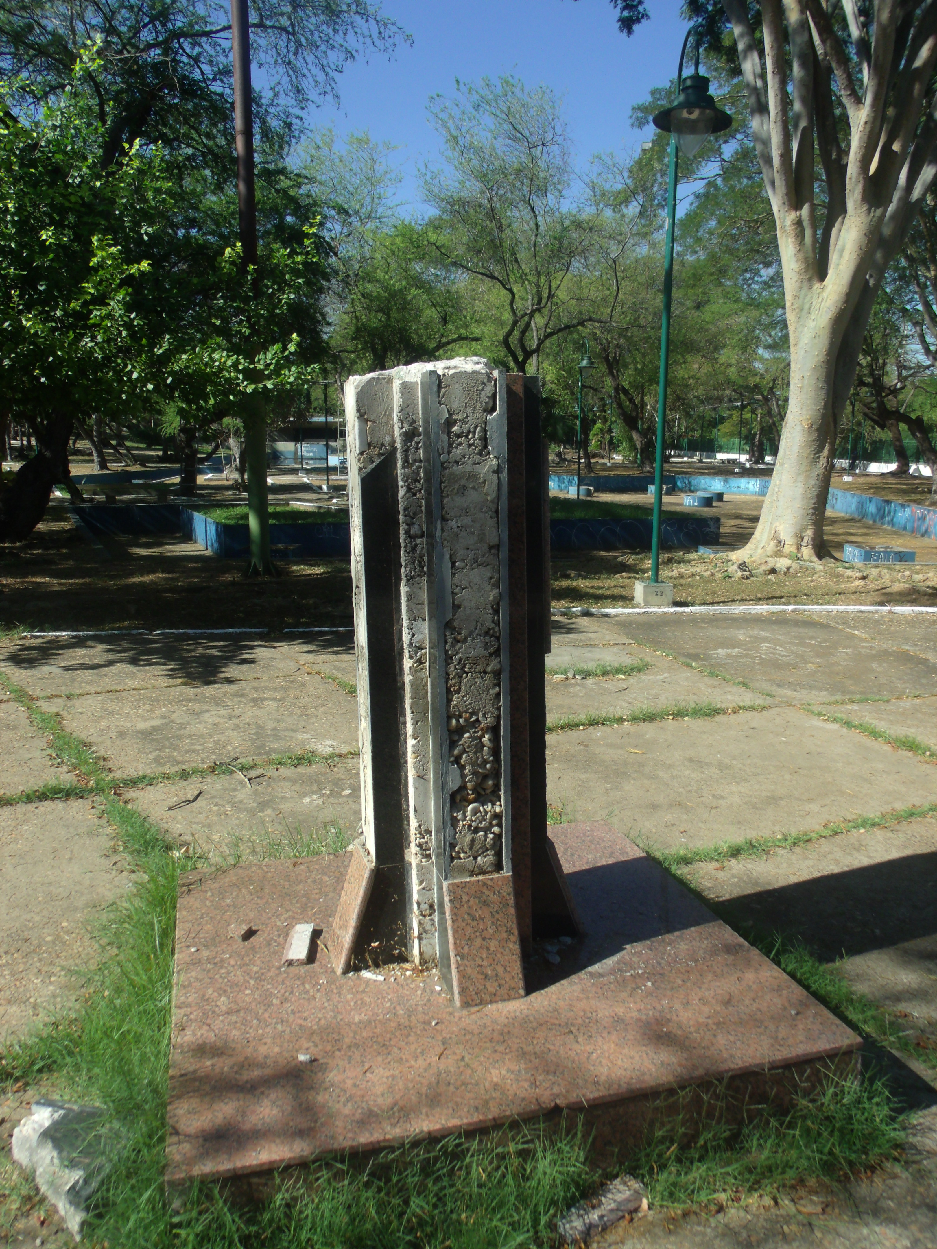 Pedestal onde existiu o busto de Antonio Francisco da Costa e Silva, poeta e autor do Hino do Estado do Piauí. O monumento ficava na praça conhecida como praça da Cepisa, em Teresina.